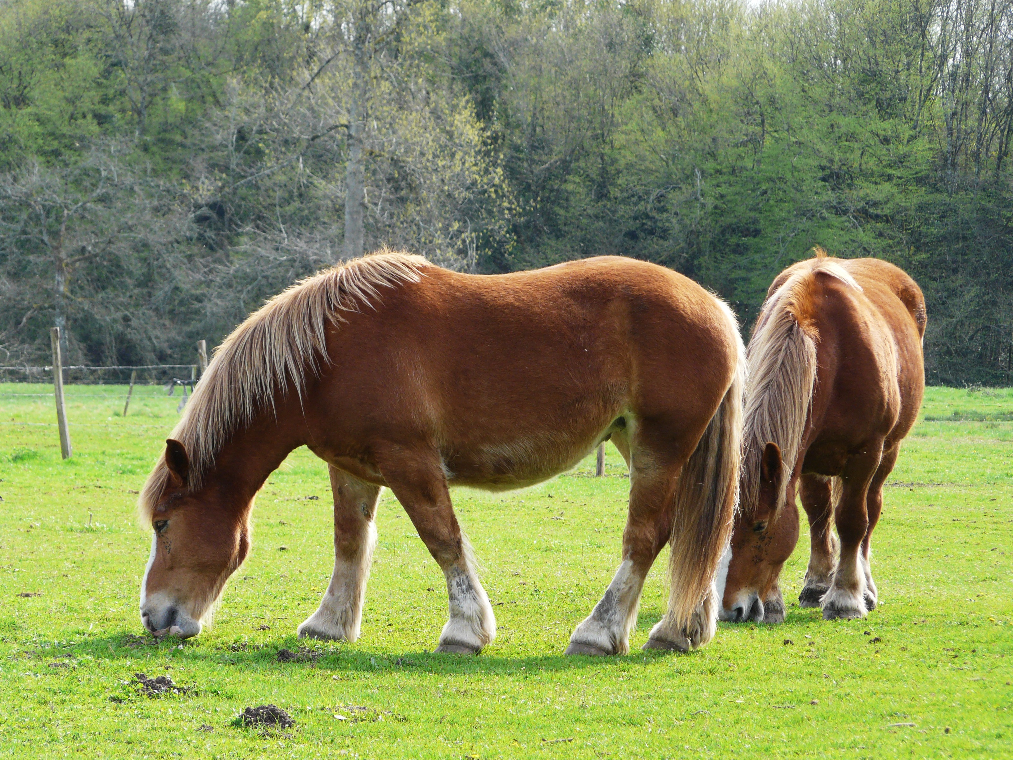 Chevaux de trait breton en Dordogne, France.